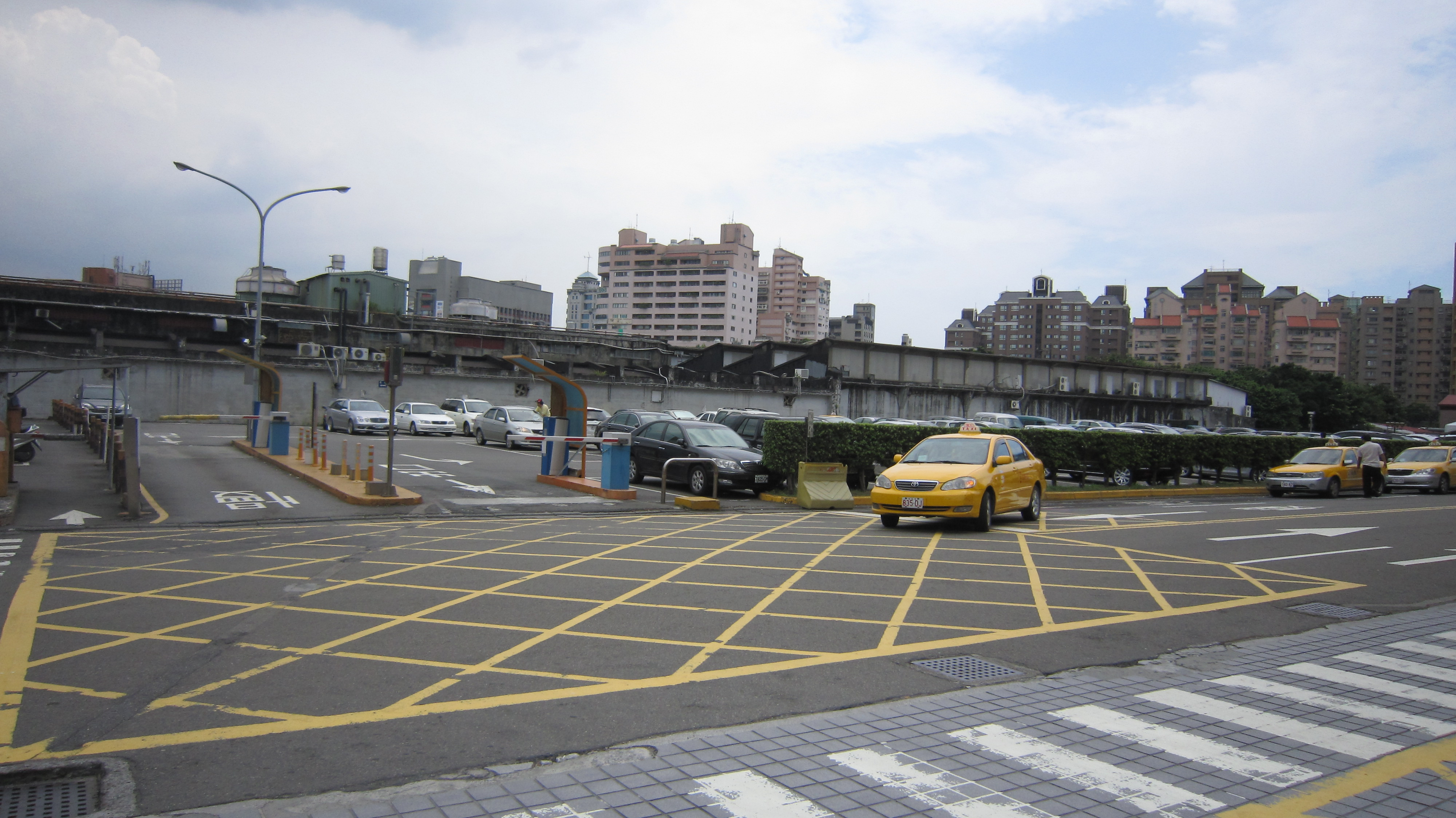 士林區新光醫院的停車場